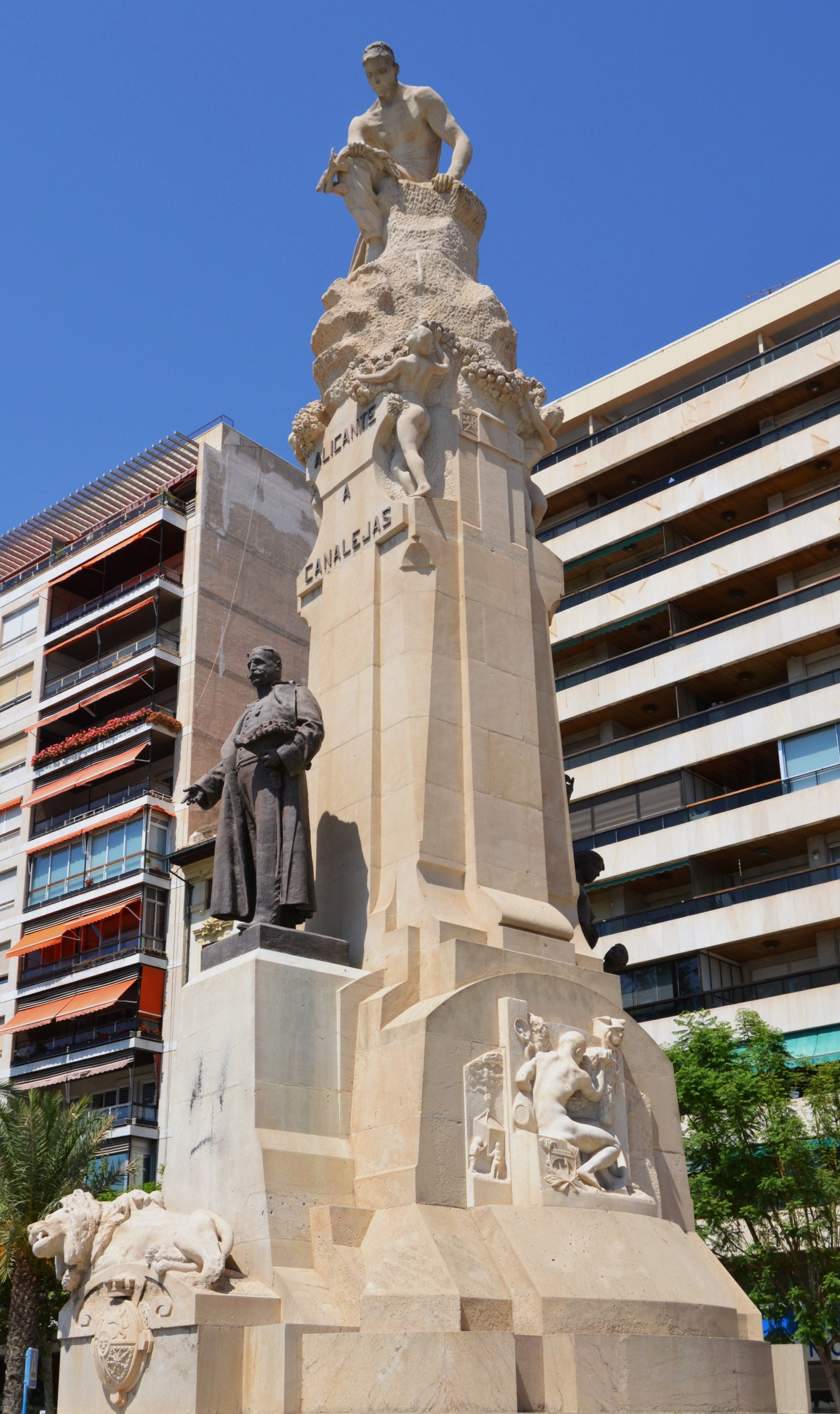 Alacant, monument a Canalejas.